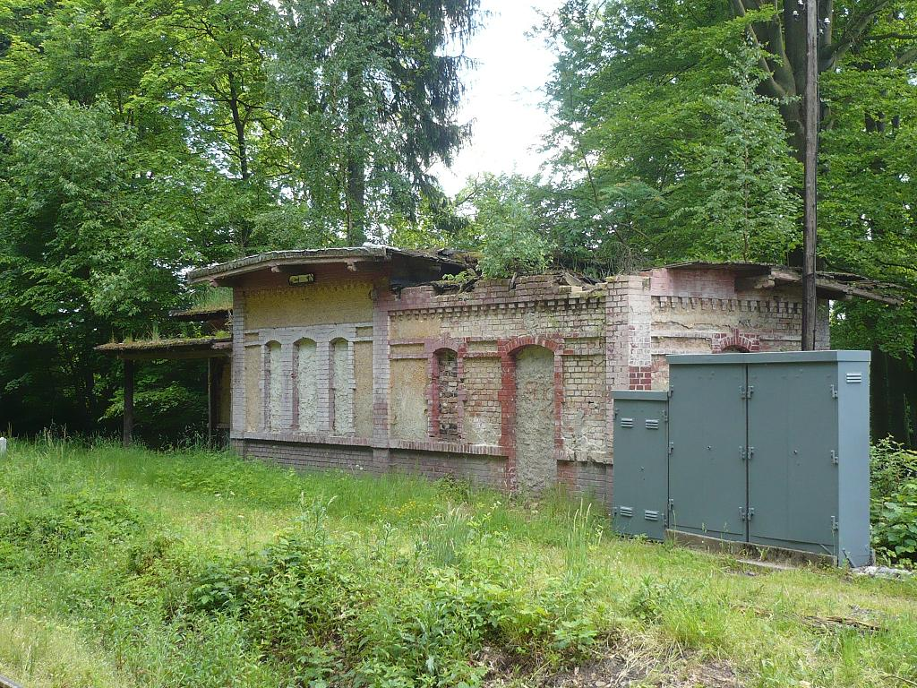 Zdrojowisko